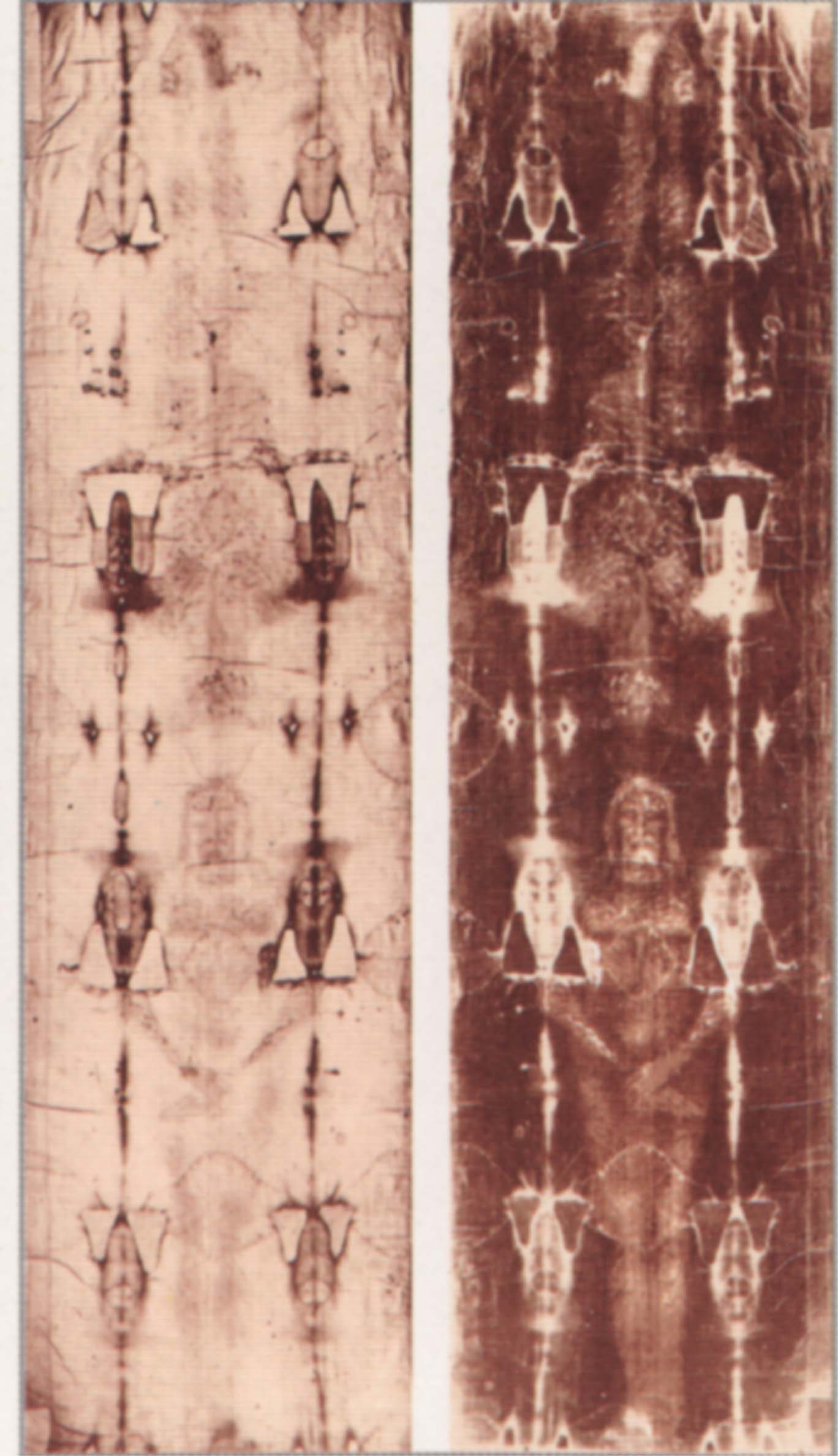 Туринская плащаница